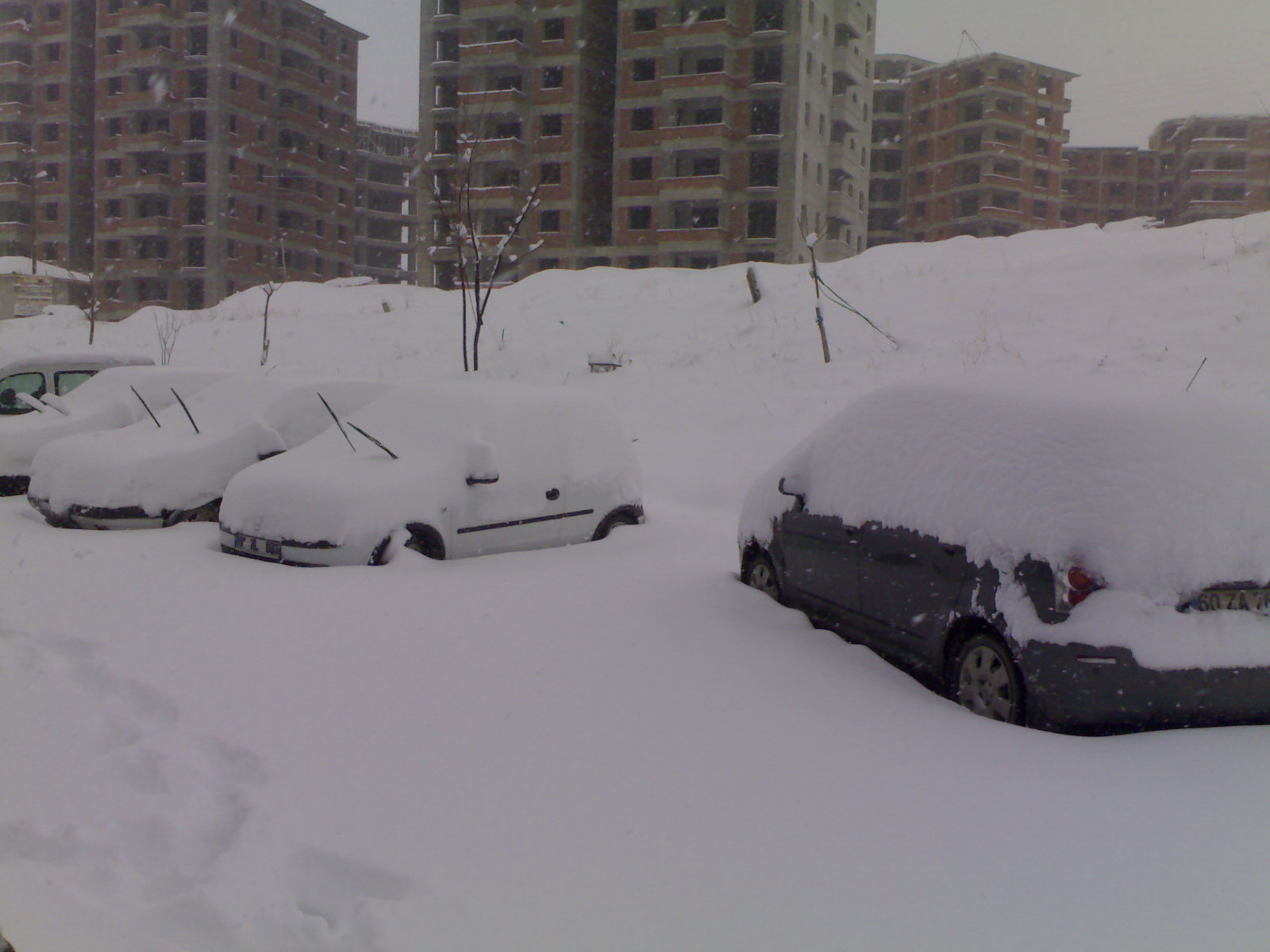 kar altında